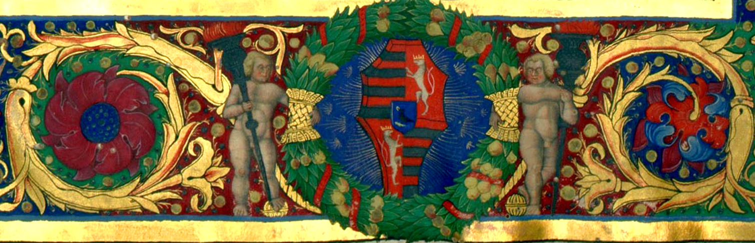 Mátyás király címere a Trapezuntius corvina díszoldalán Cod. Lat. 281 Trapezuntius, Georgius: Rhetorica 1480-as évek. Buda, Pergamen.